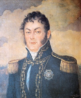 Juan Martín de Pueyrredón, Director Supremo de las Provincias Unidas del Río de la Plata.